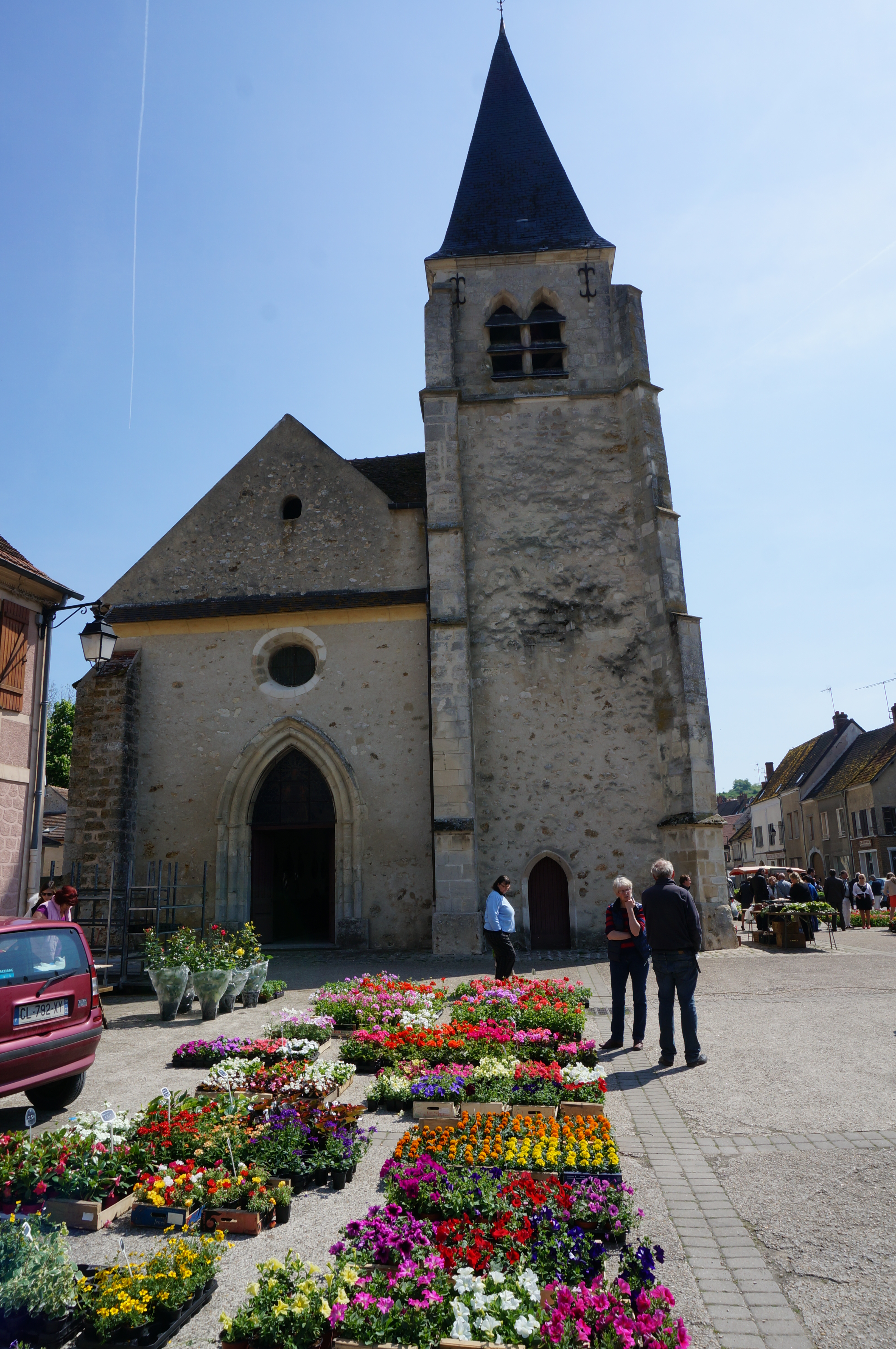 vue de la Église Saint-Rémi de Condé-en-Brie.